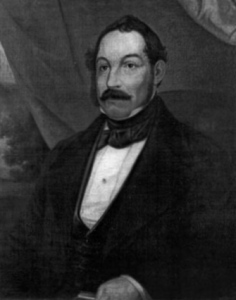 Jan Norbert z Neuberka